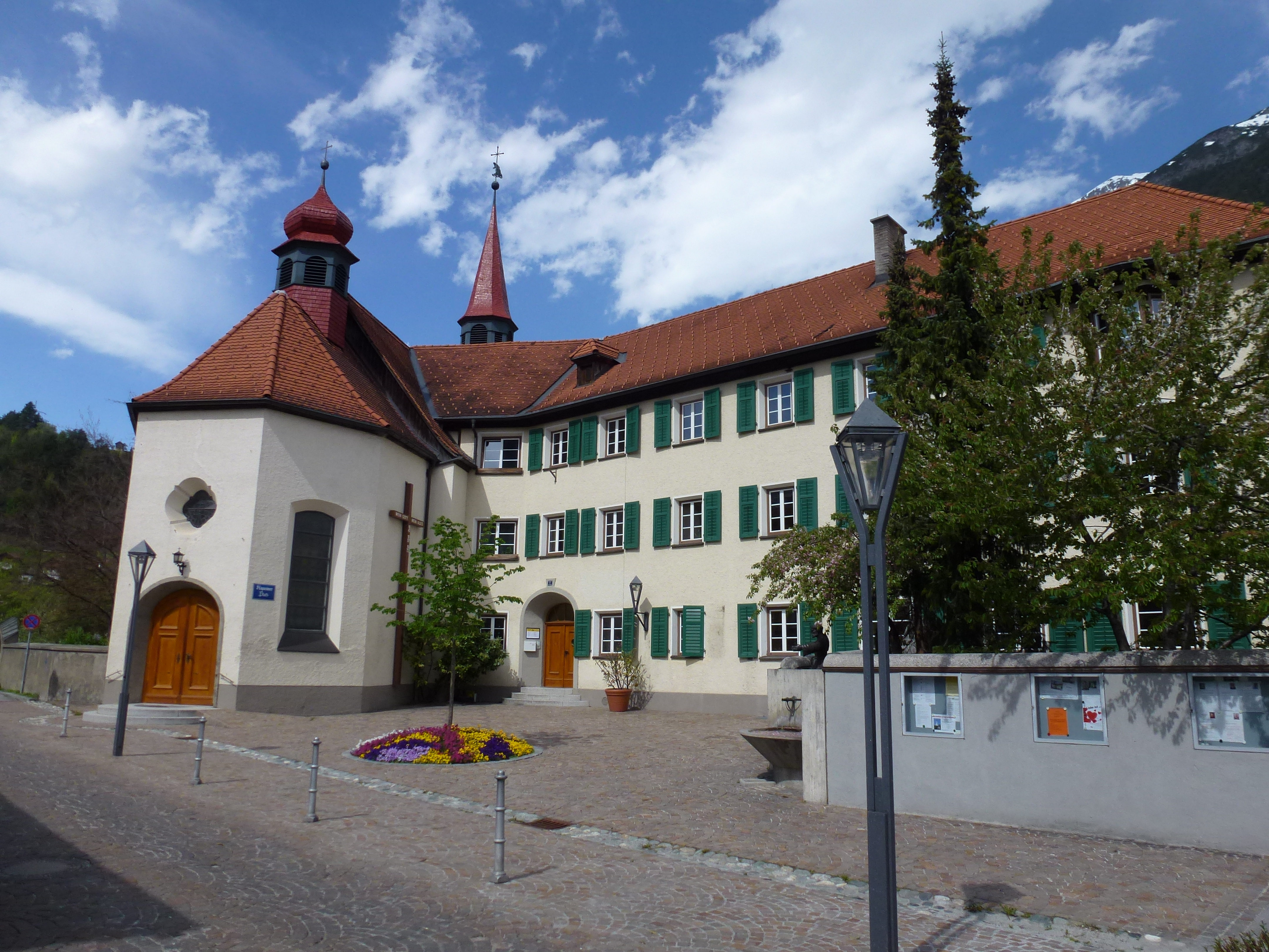 Kapuzinerkloster und Pfarrvikariatskirche Unsere Liebe Frau Mariahilf - Kirchenstraße 7, Landeck